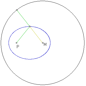 Ellips met richtcirkel